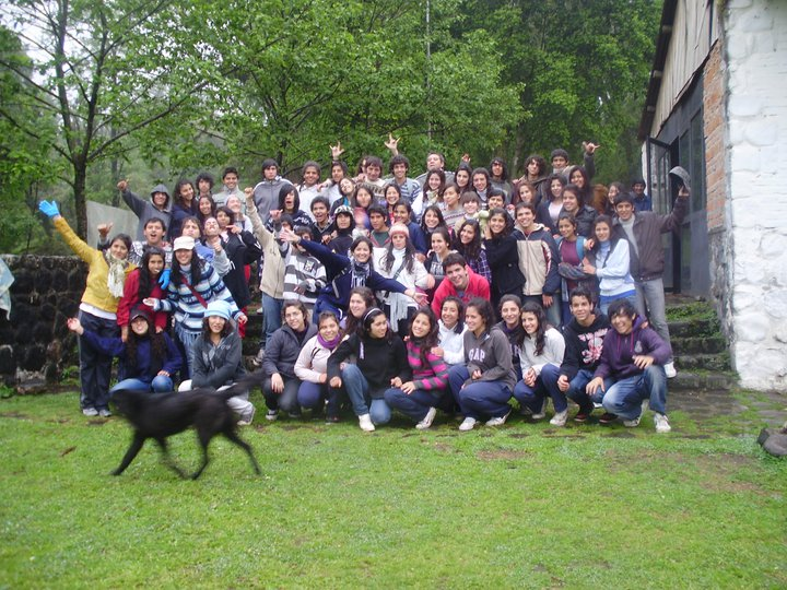 Campamento realizado en el año 2010 en Samay Cochuna con la Escuela de Bellas Artes